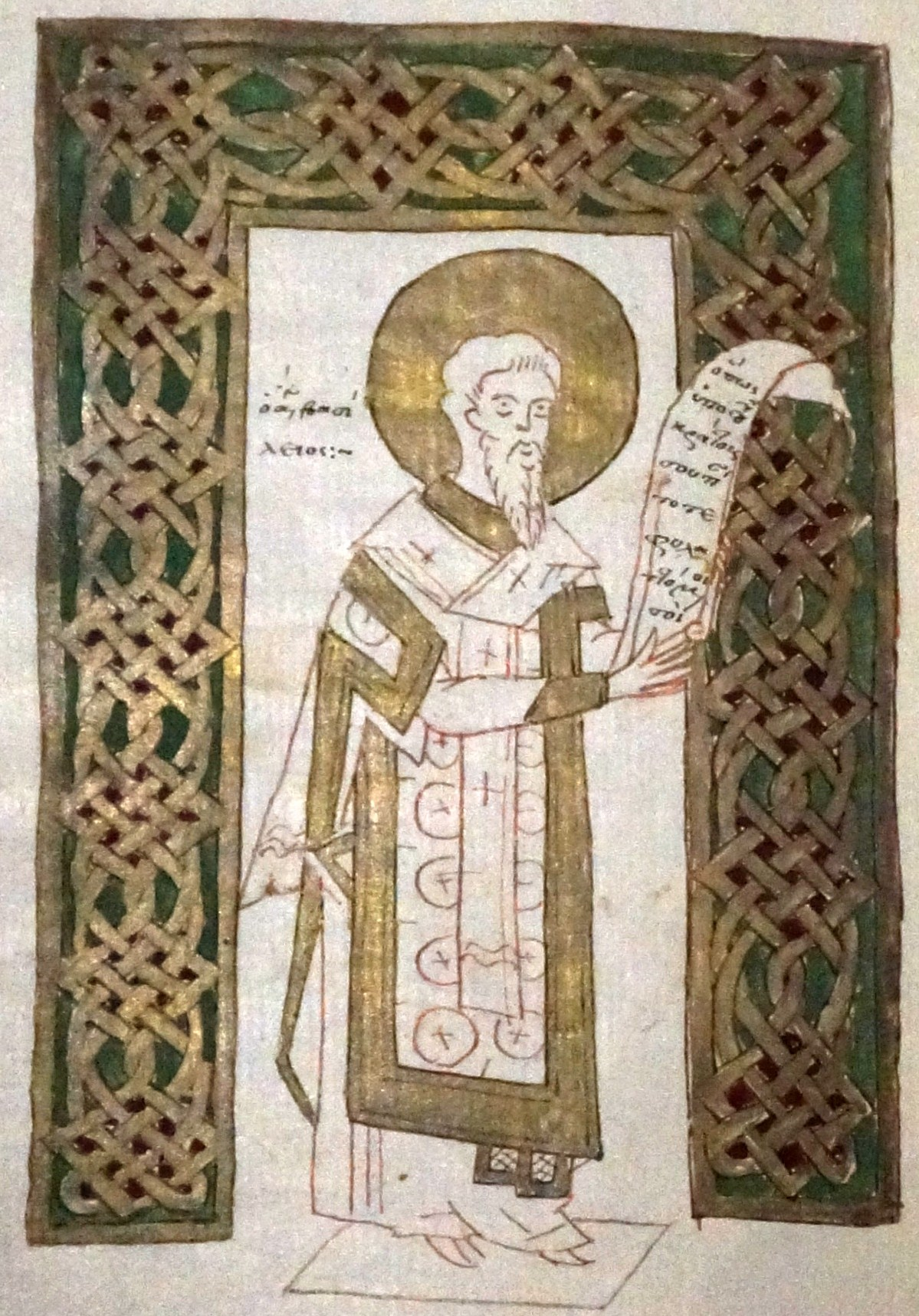 présenté au Museum of Byzantine Culture .